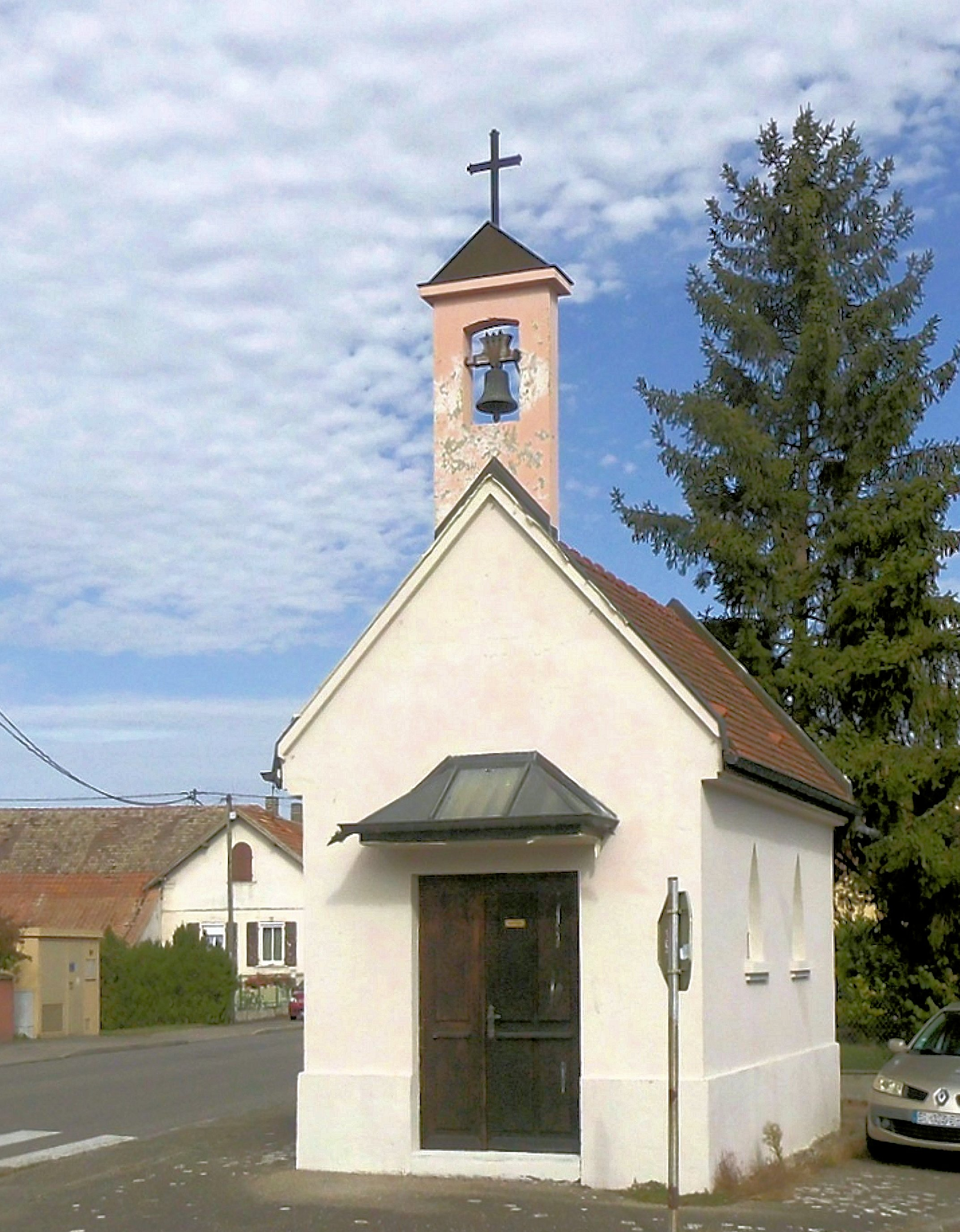 La chapelle des Quatorze-Saints-Intercesseurs à Balgau